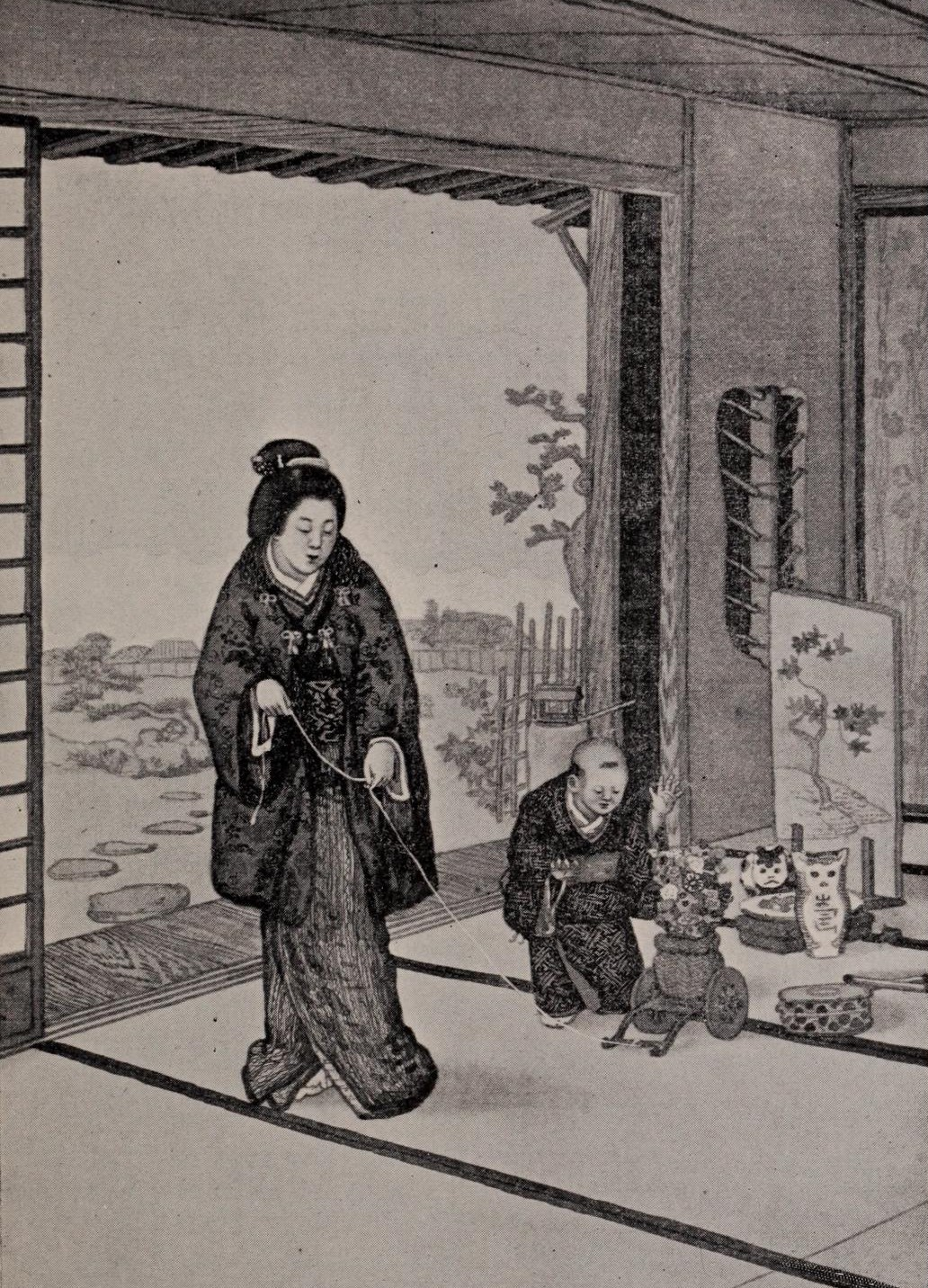 花車で遊ぶ